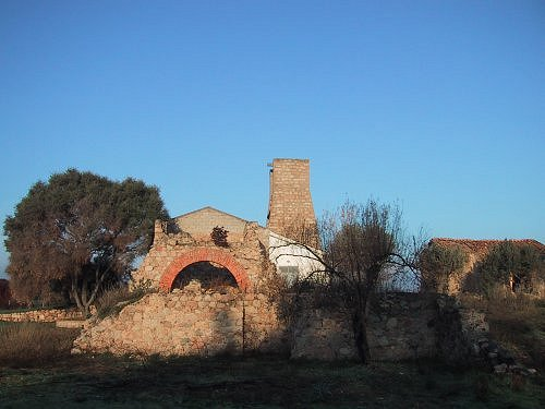 Veduda della miniera si Salaponi.